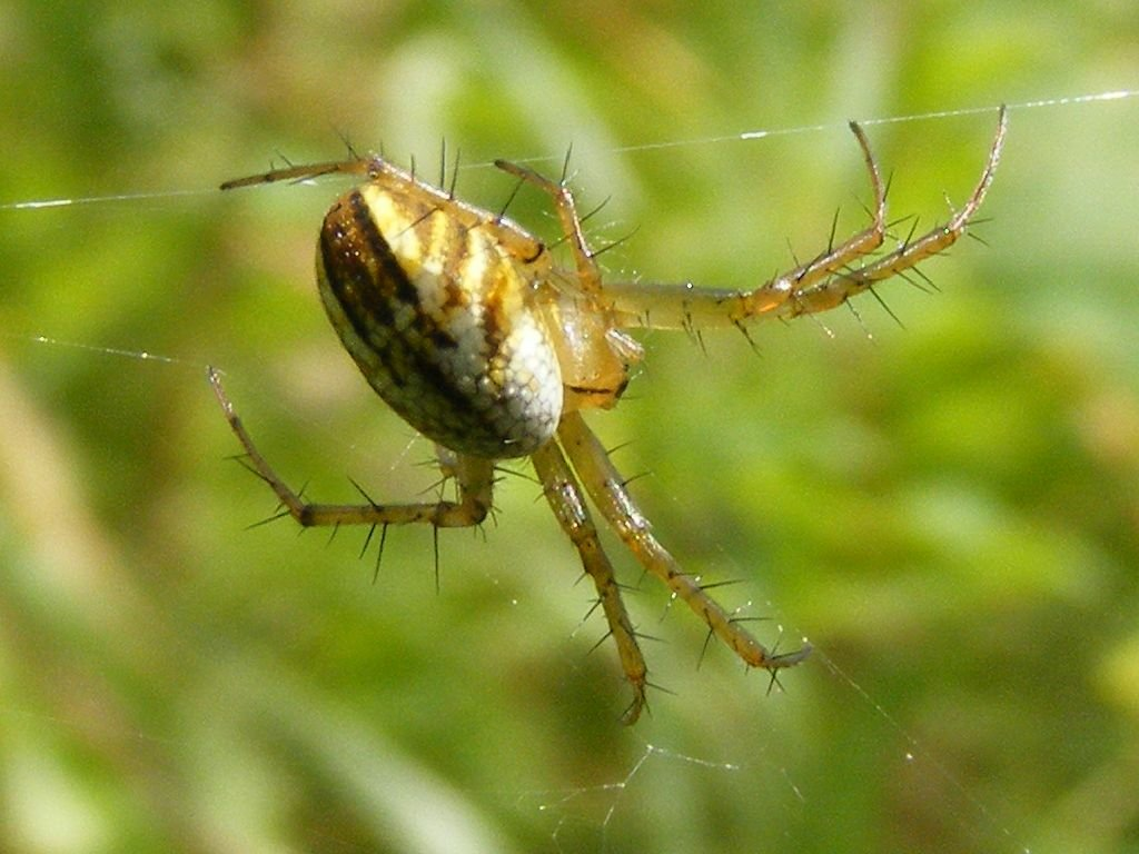 Mangora gibberosa : Photographié dans la région montréalaise le 27 août 2010, sur Fujifilm FinePix S700.